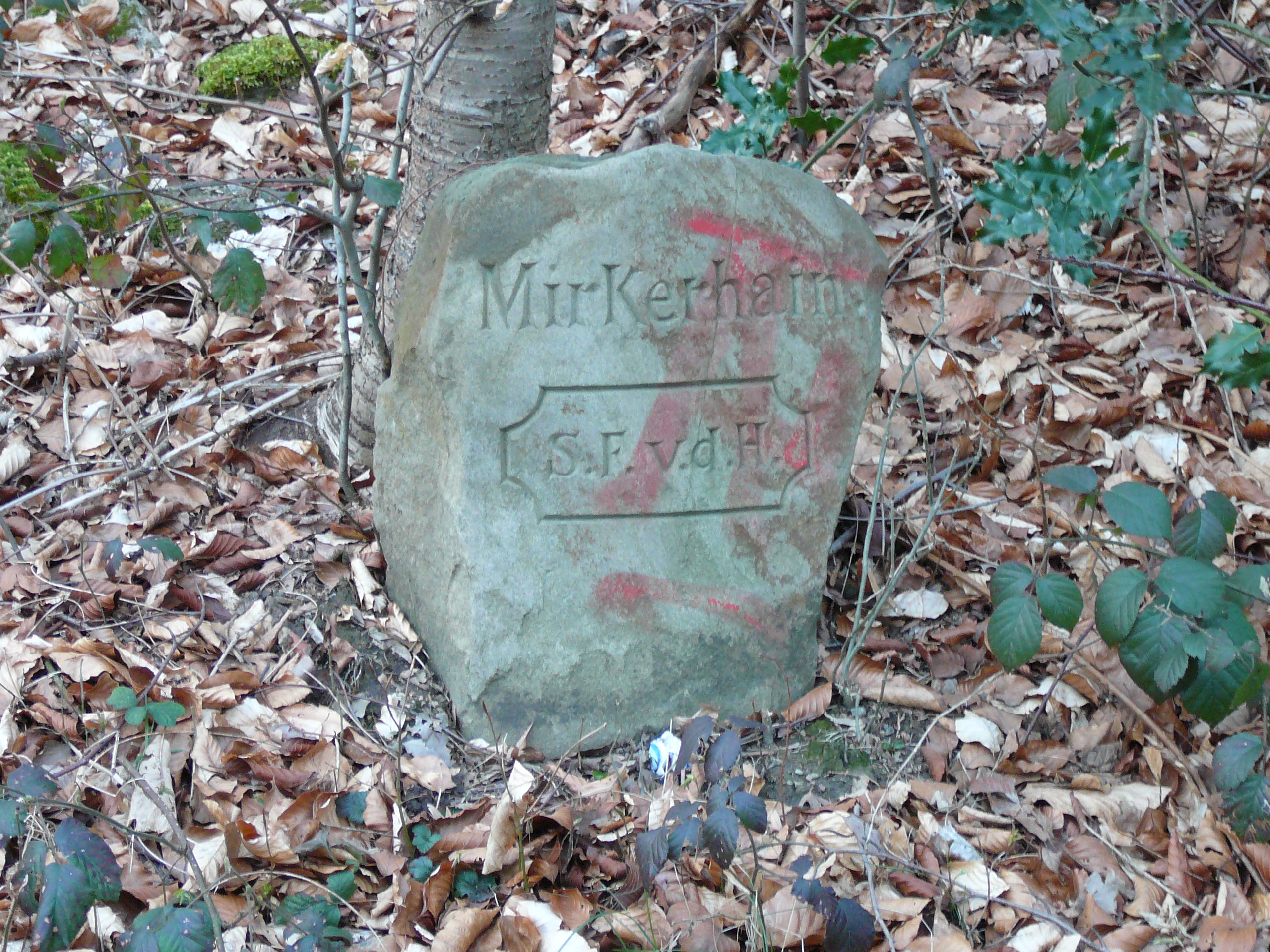 Vogelsangstraße, Wuppertal-Elberfeld